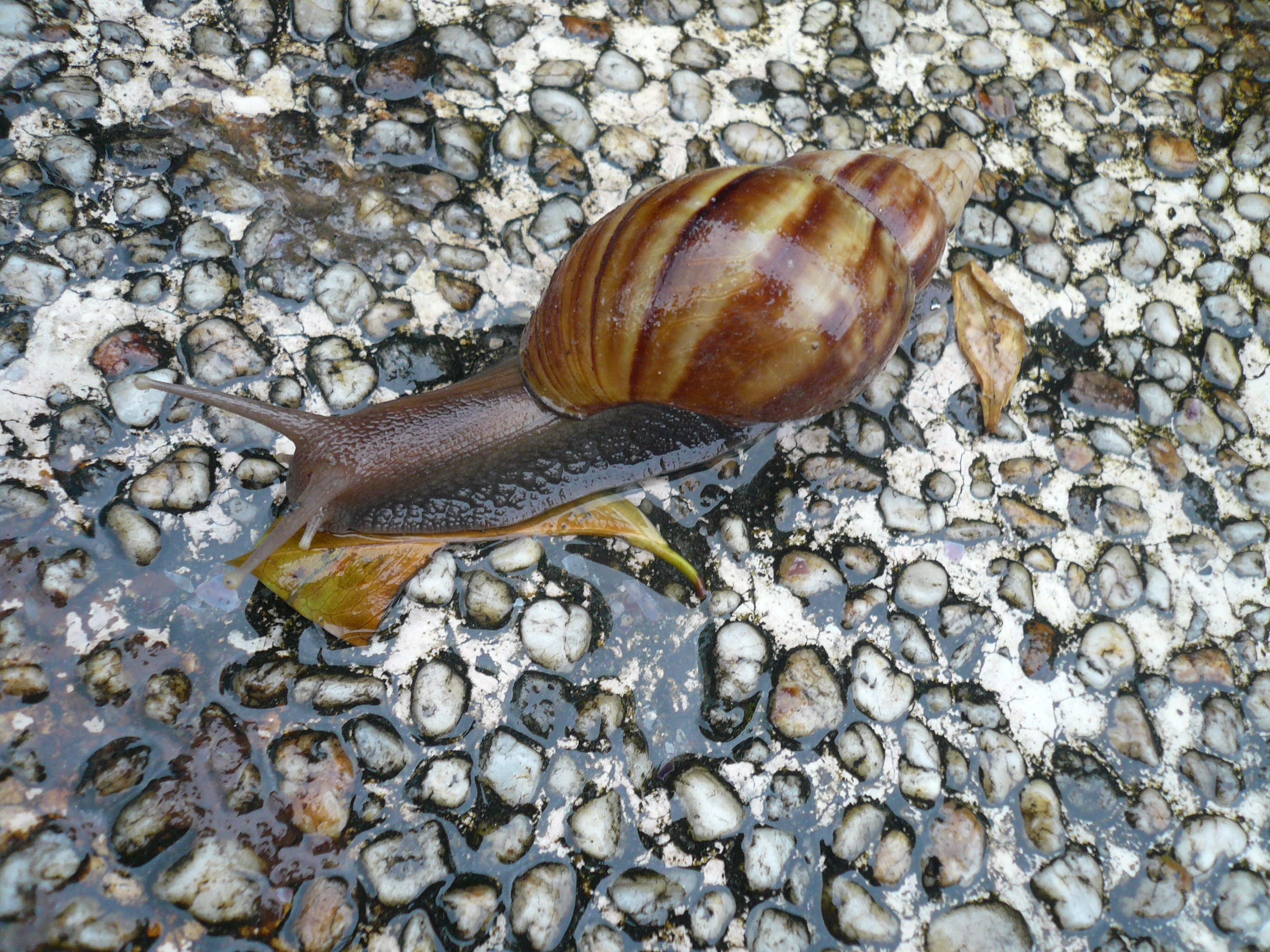 Улитка, выползшая на тротуар после дождя. Сфотографировано в Макао.